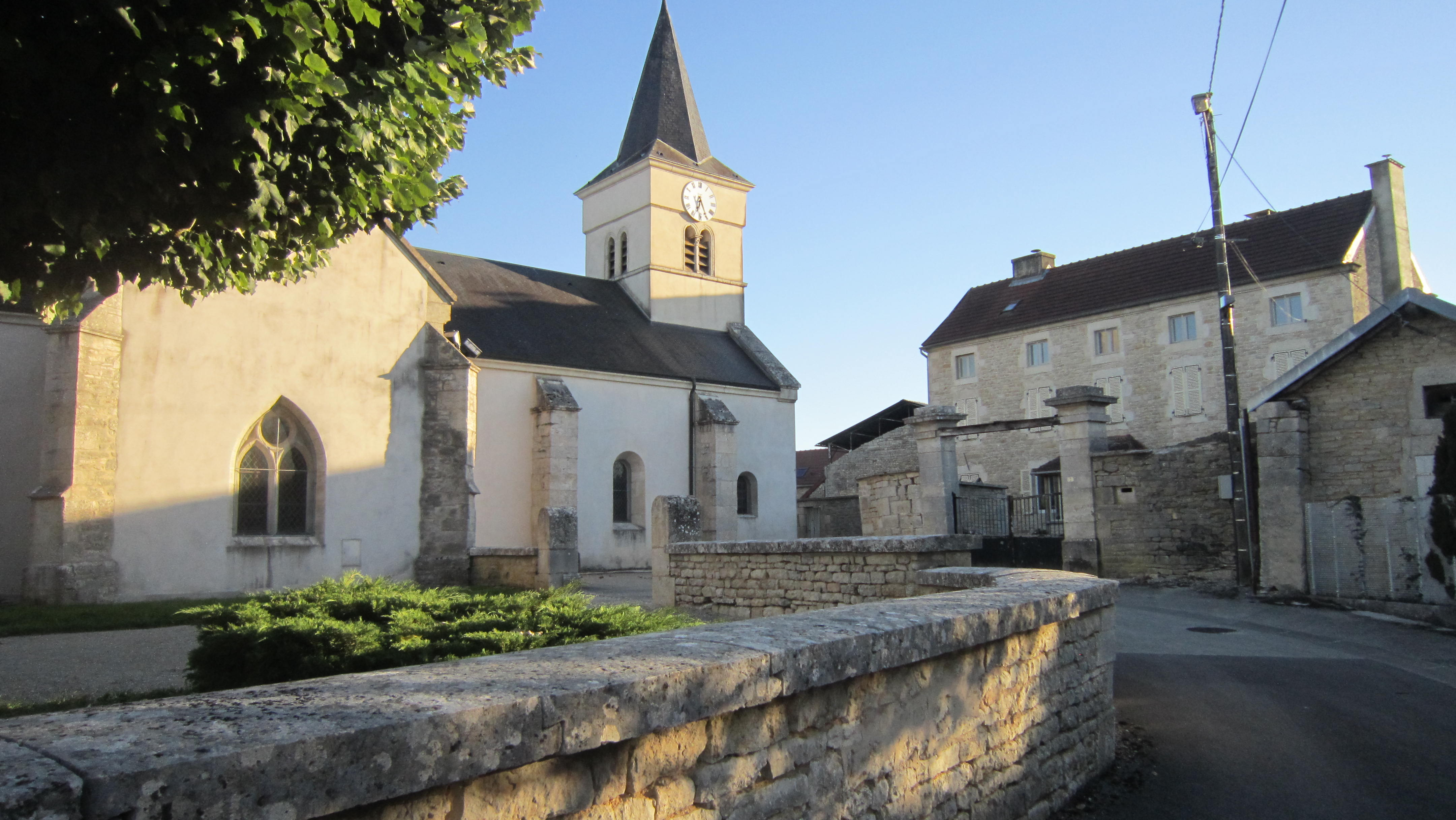 Balot (Côte-d'Or)